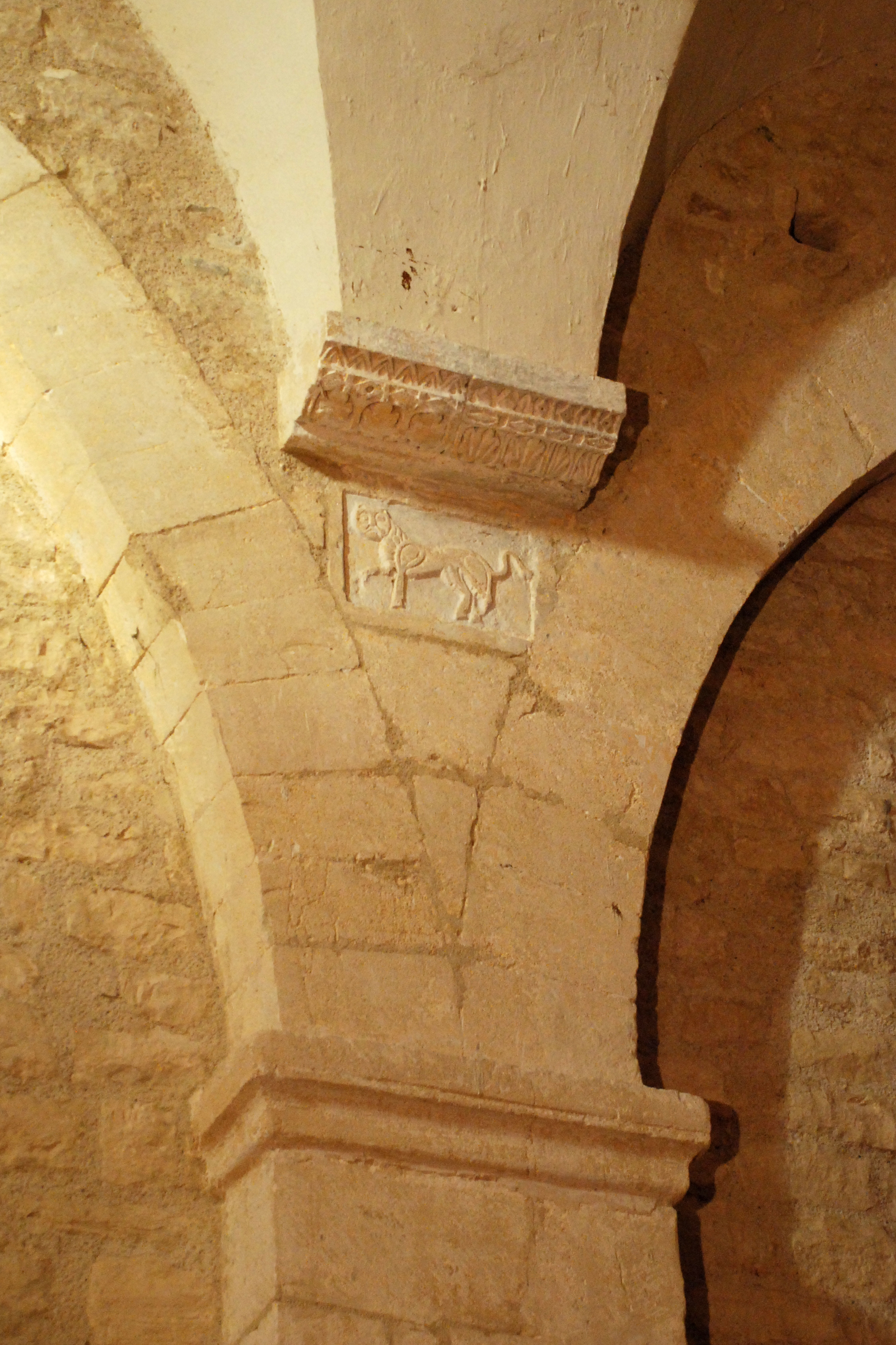 France - Provence - Alpes-de-Haute-Provence - Église de Saint-Martin-les-Eaux